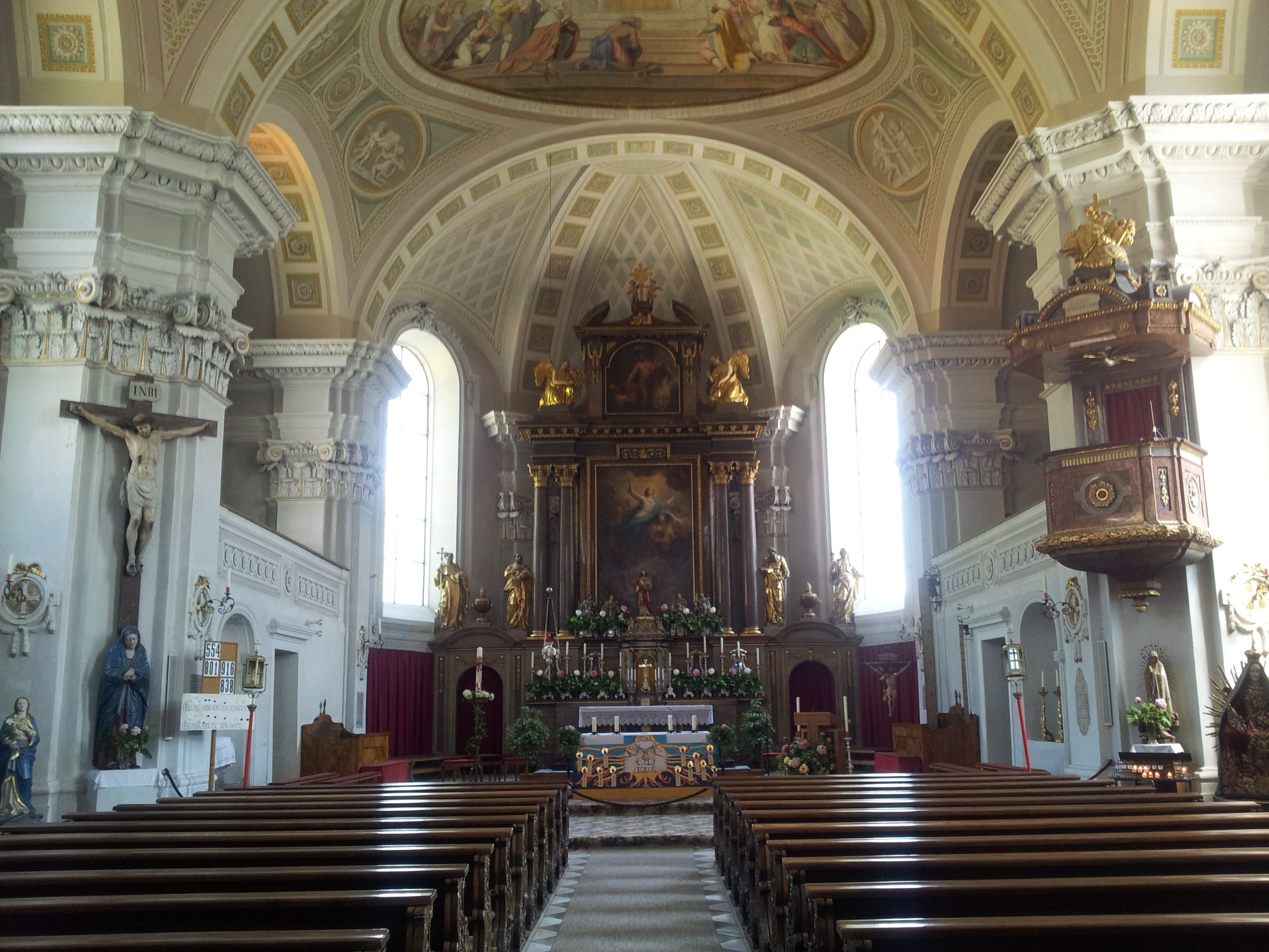 Innenraum der Pfarrkirche Brixen